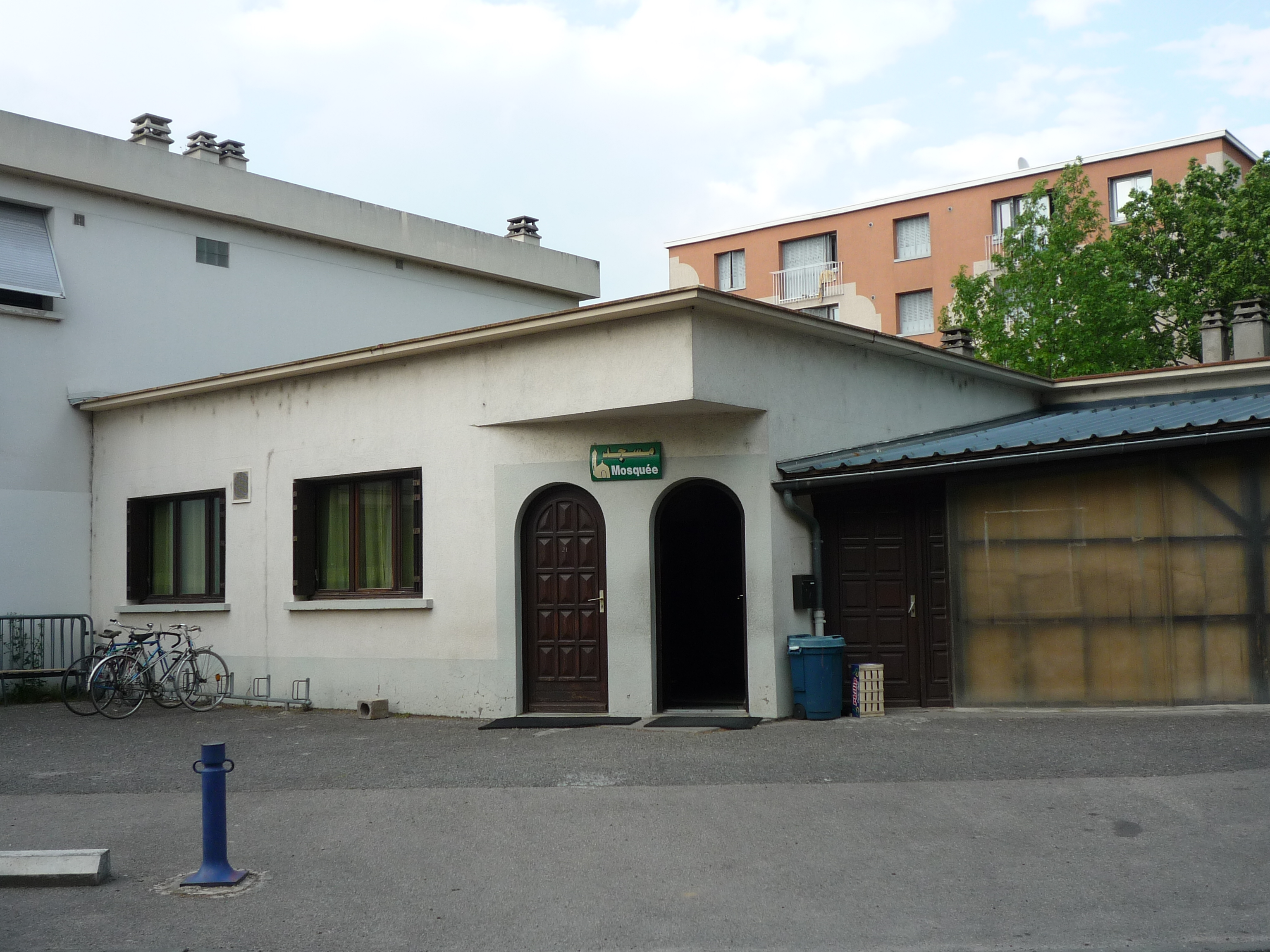 La Mosquée de Saint-Martin-d'Hères.